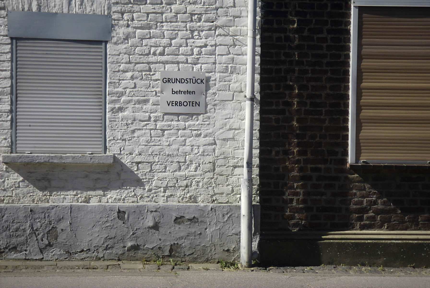 Leerstehende Gebäude in Spenrath